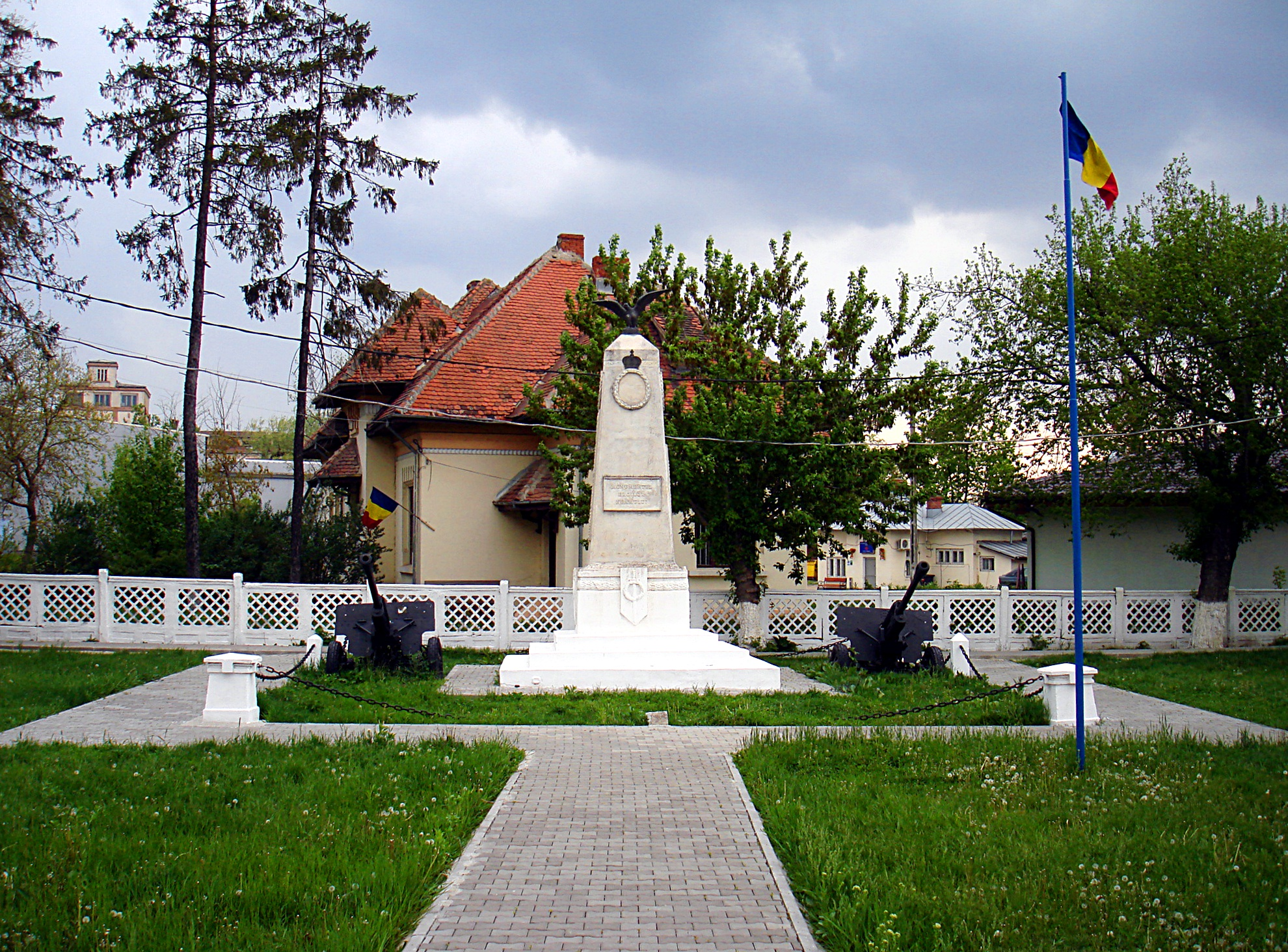 Monumentul eroilor din Chitila